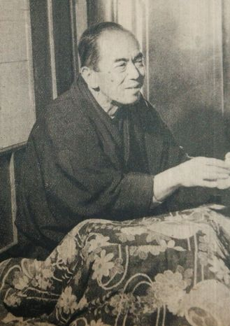 佐々紅華